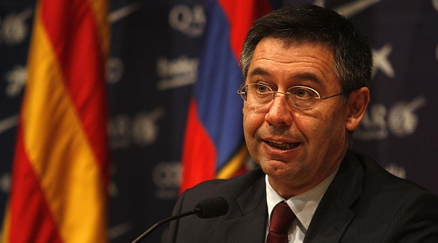 Bartomeu, em coletiva de imprensa